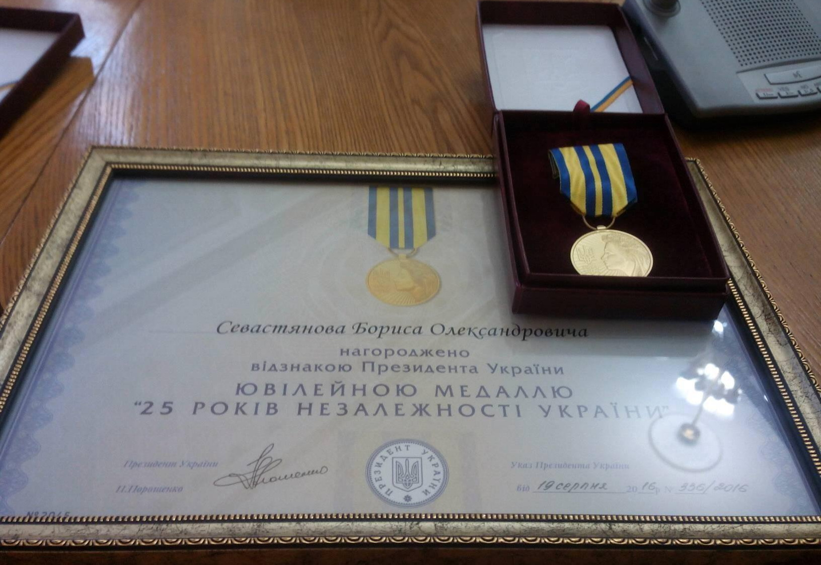 Севастянов Борис Олександрович. Відзнака Президента України ювілейна медаль «25 років незалежності України».